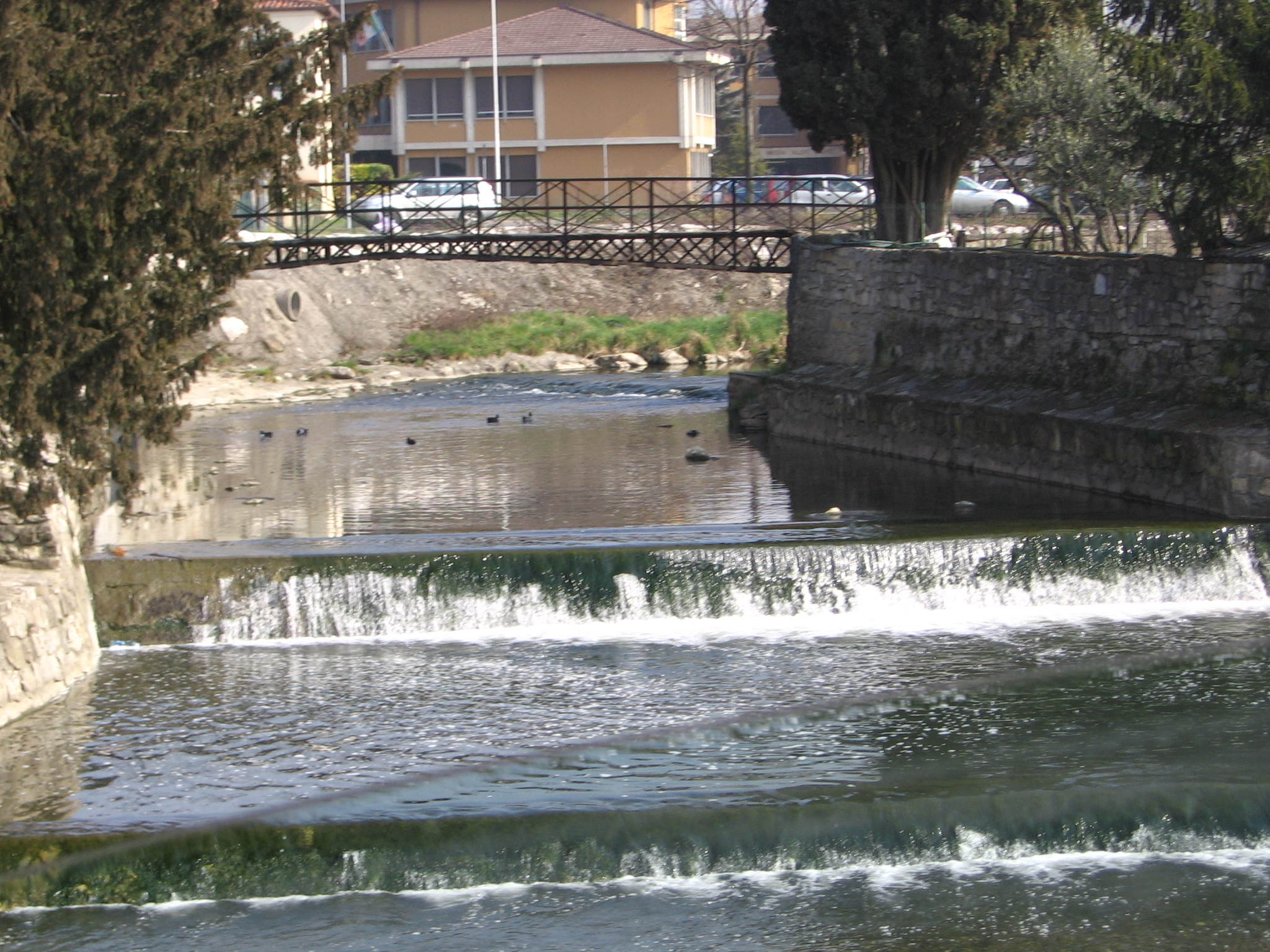 Gorlago, Bergamo, Italy